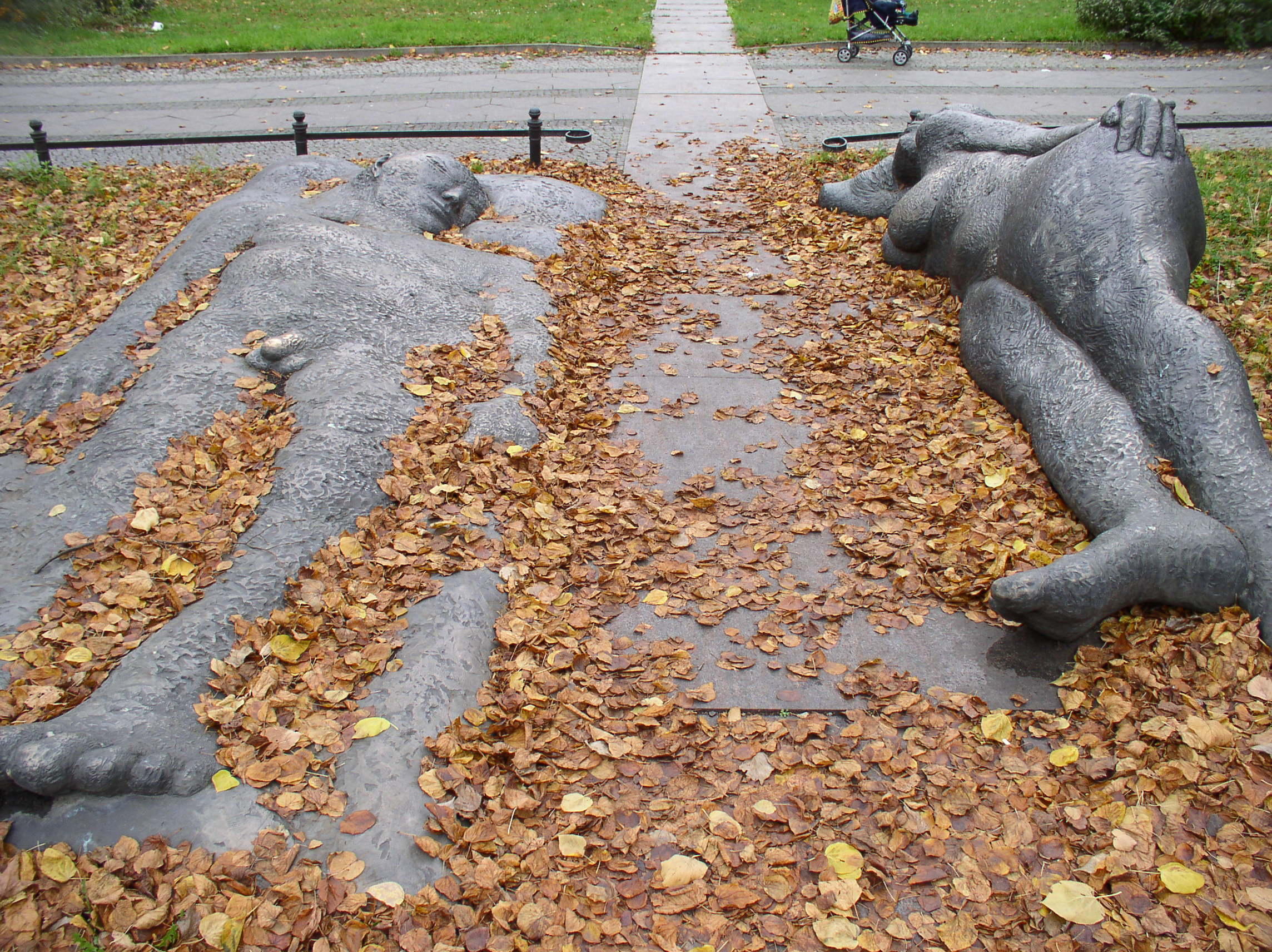 Skulptur „Dove Vai“ (ital. für „Wohin gehst du?“) des Bildhauers Andreas Wegner (* 1958), Teil der Menschenlandschaft Berlin.